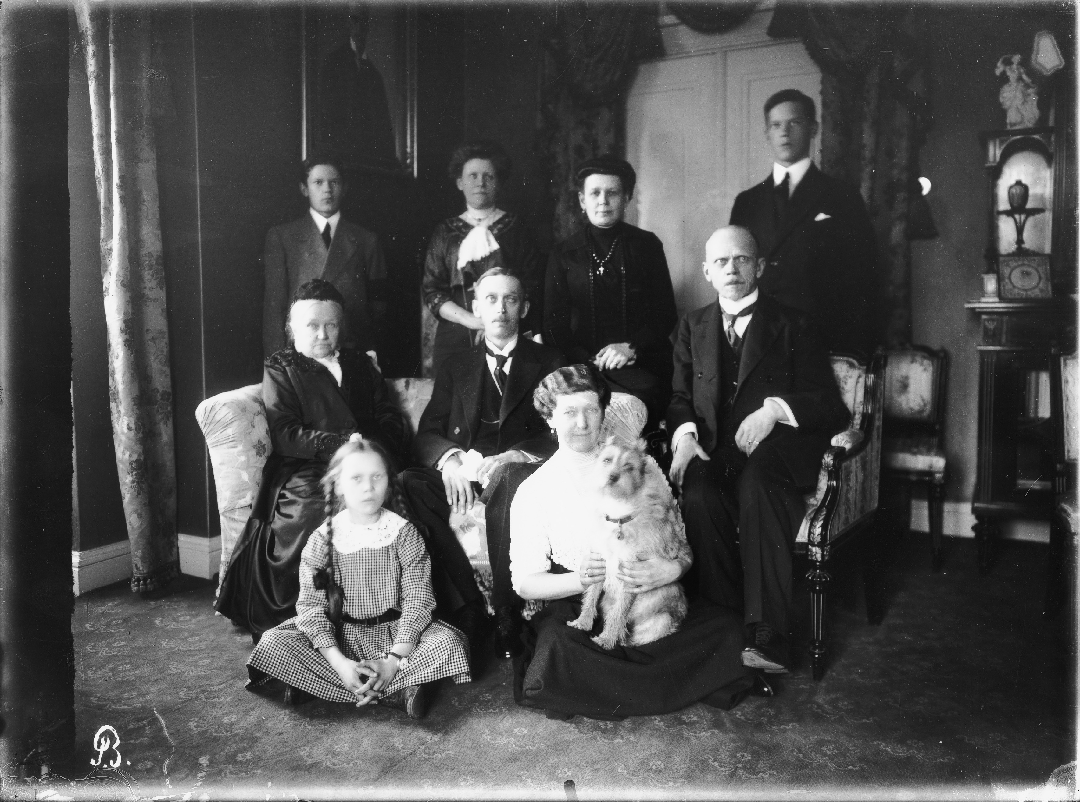 Indreniuksen perhe kotonaan ryhmäkuvassa.; negatiivi repronegatiivi vedos, lasi filmi paperi, mv